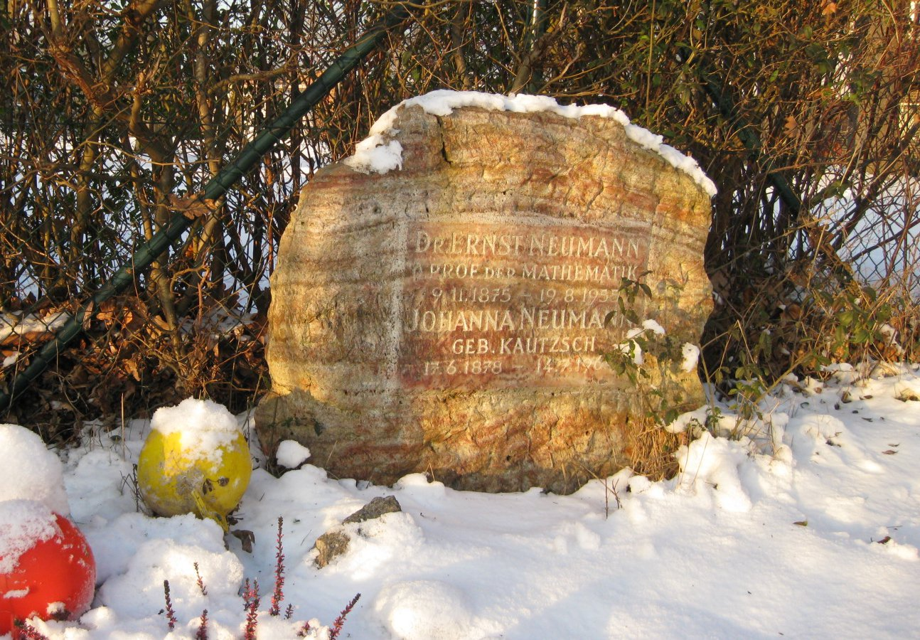 Grabstein des Mathematikers Ernst Richard Neumann (1976-1955). Ehemals auf dem Friedhof in Dornholzhausen (Bad Homburg), seit Mitte der 1970er in Privatbesitz in Berlin-Köpenick.